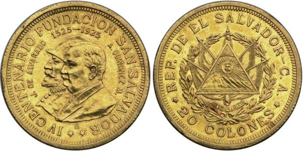 20 colones de El Salvador conmemorativo en plata de 1925